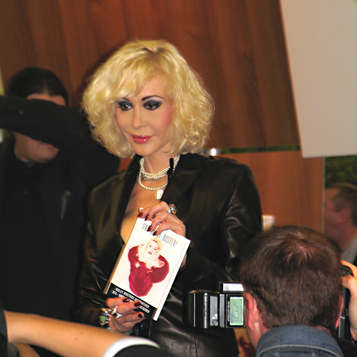 Dolly Buster bei der Präsentation ihres Buches "Und damit: Buster!" auf der Buchmesse in Frankfurt (2004)